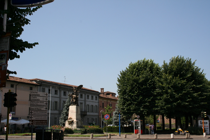 Romano di Lombardia (Bg), panorama.